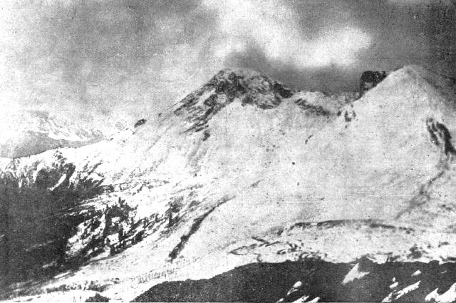 Col di Lana na tirolski fronti